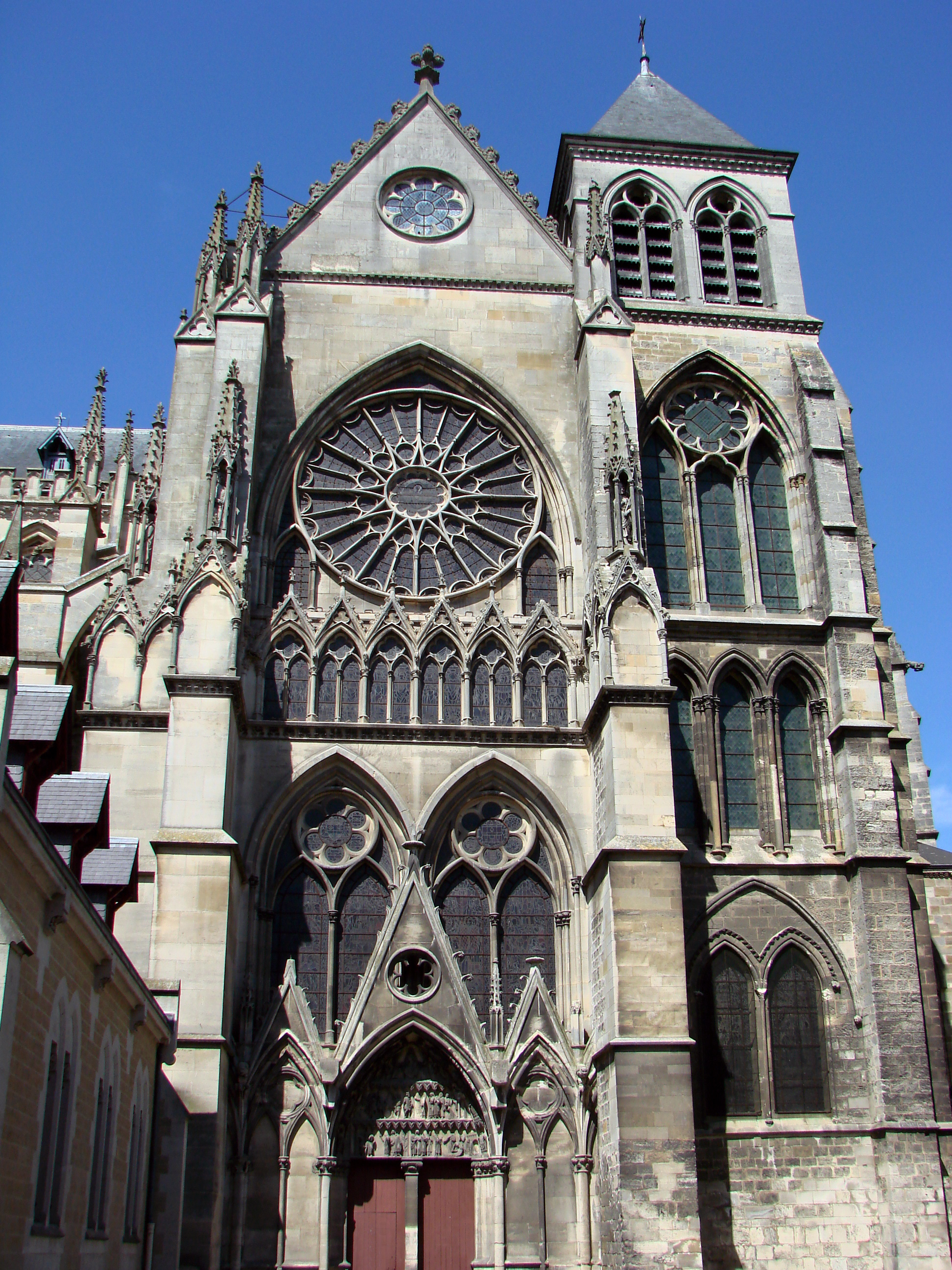 Cathédrale Saint-Etienne, Châlons-en-Champagne, vue du transept Sud.